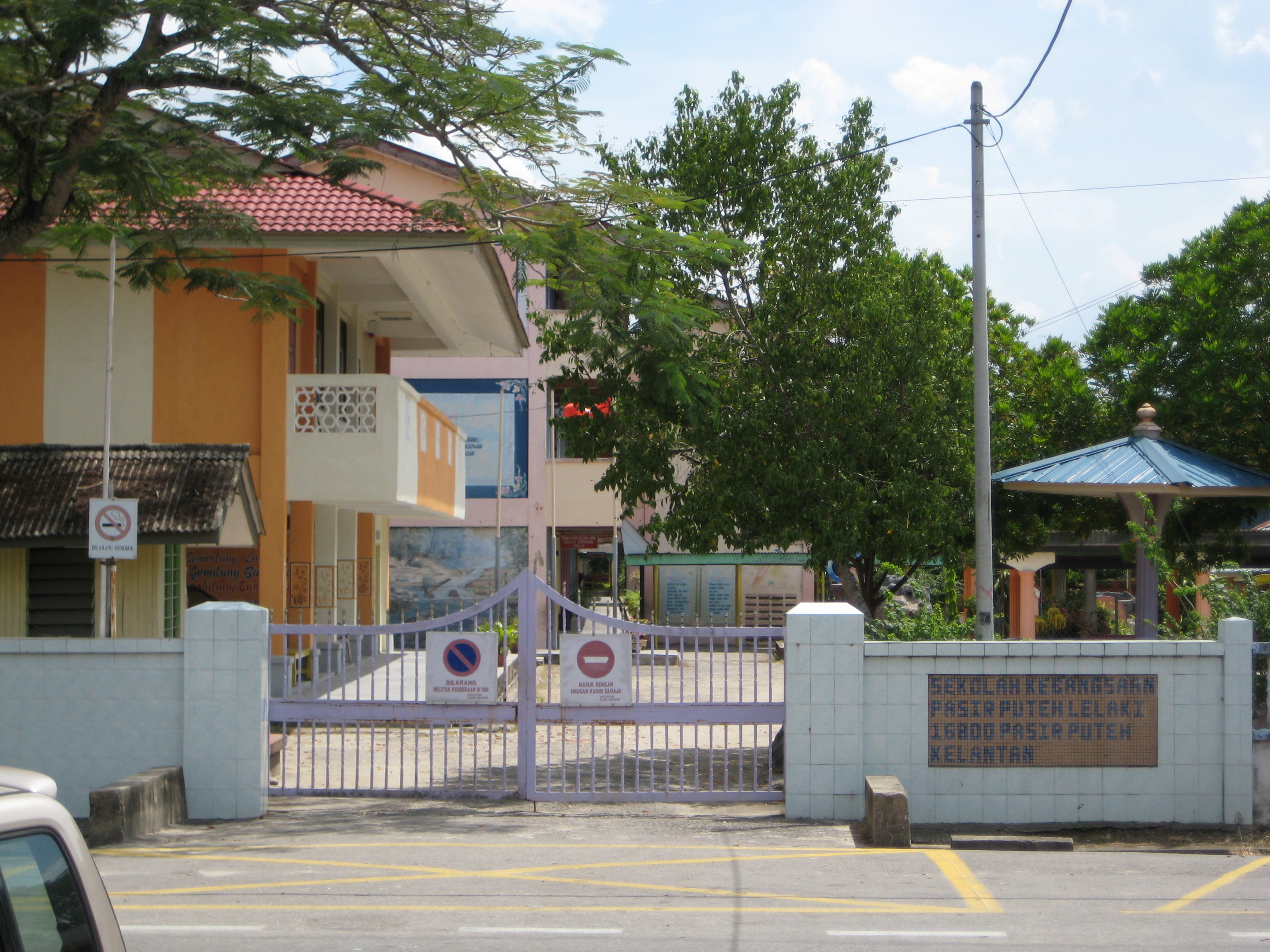 Pintu masuk ke SKPPL. Gambar diambil pada 7 Jun 2008.